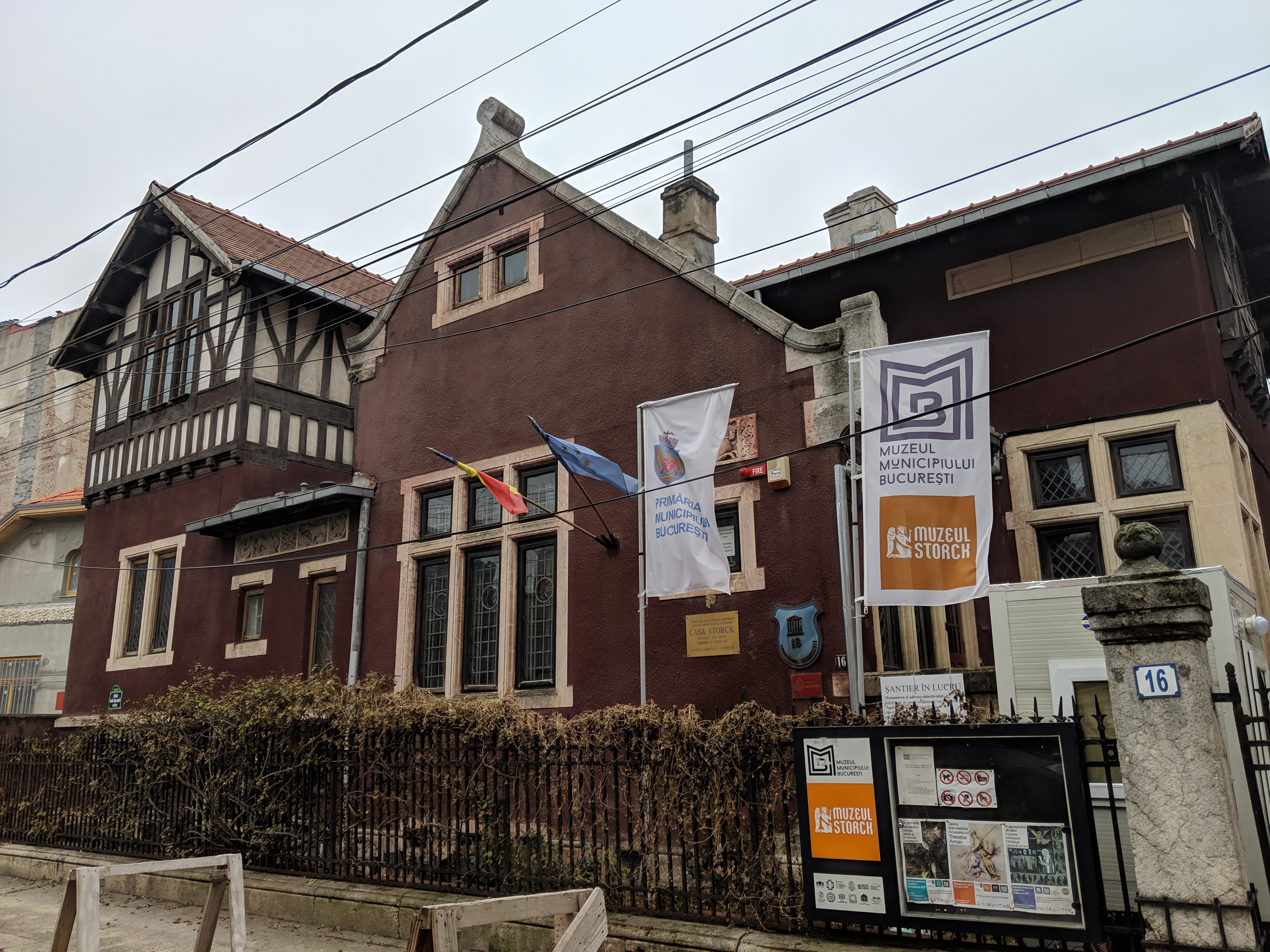 Frederic and Cecilia Cuțescu-Storck Art Museum, Alecsandri Vasile Street, no 16, Bucharest, Romania